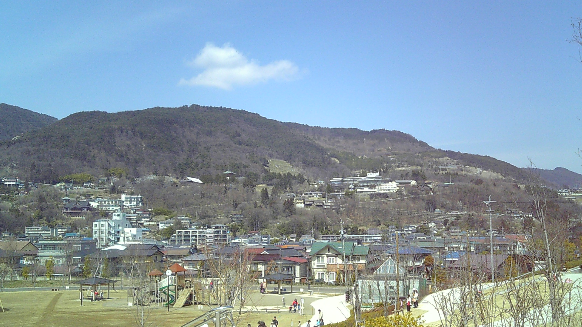 城山公園から撮影した地附山